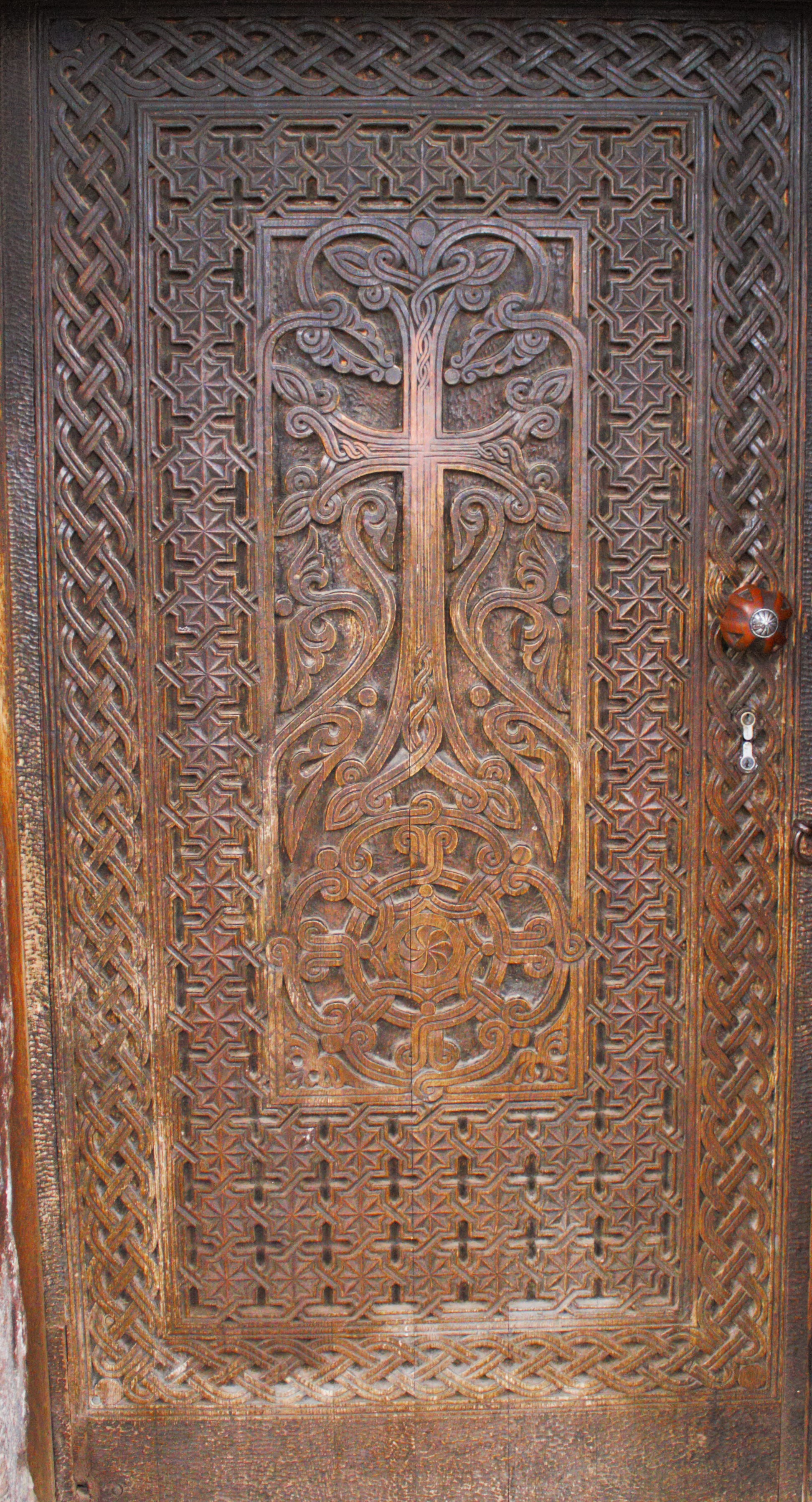 Խոր Վիրապի Սուրբ Աստվածածին եկեղեցու դուռը 49/1.1